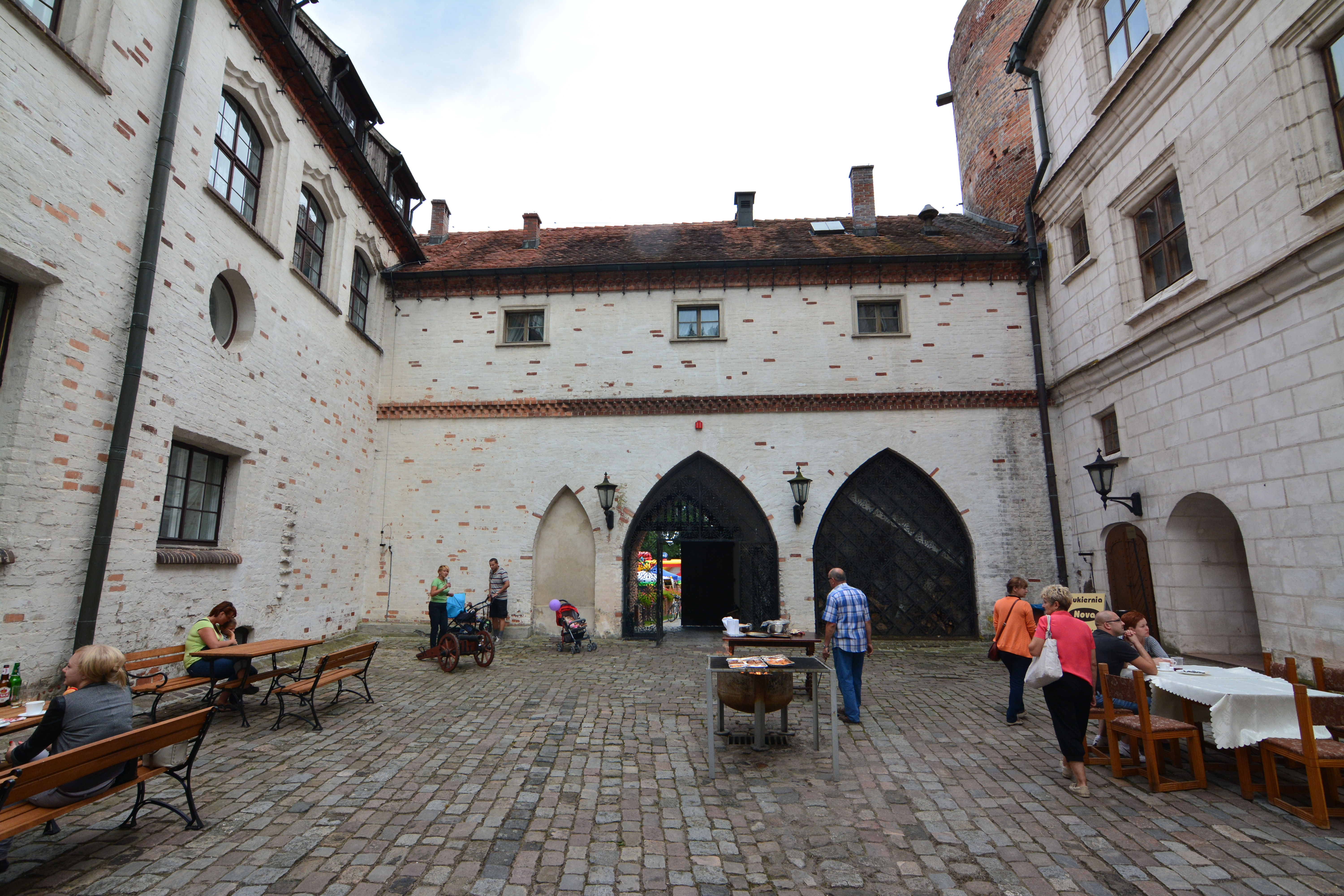 Pęzino - zamek, XIV, 1 poł. XVI, 1600, XIX